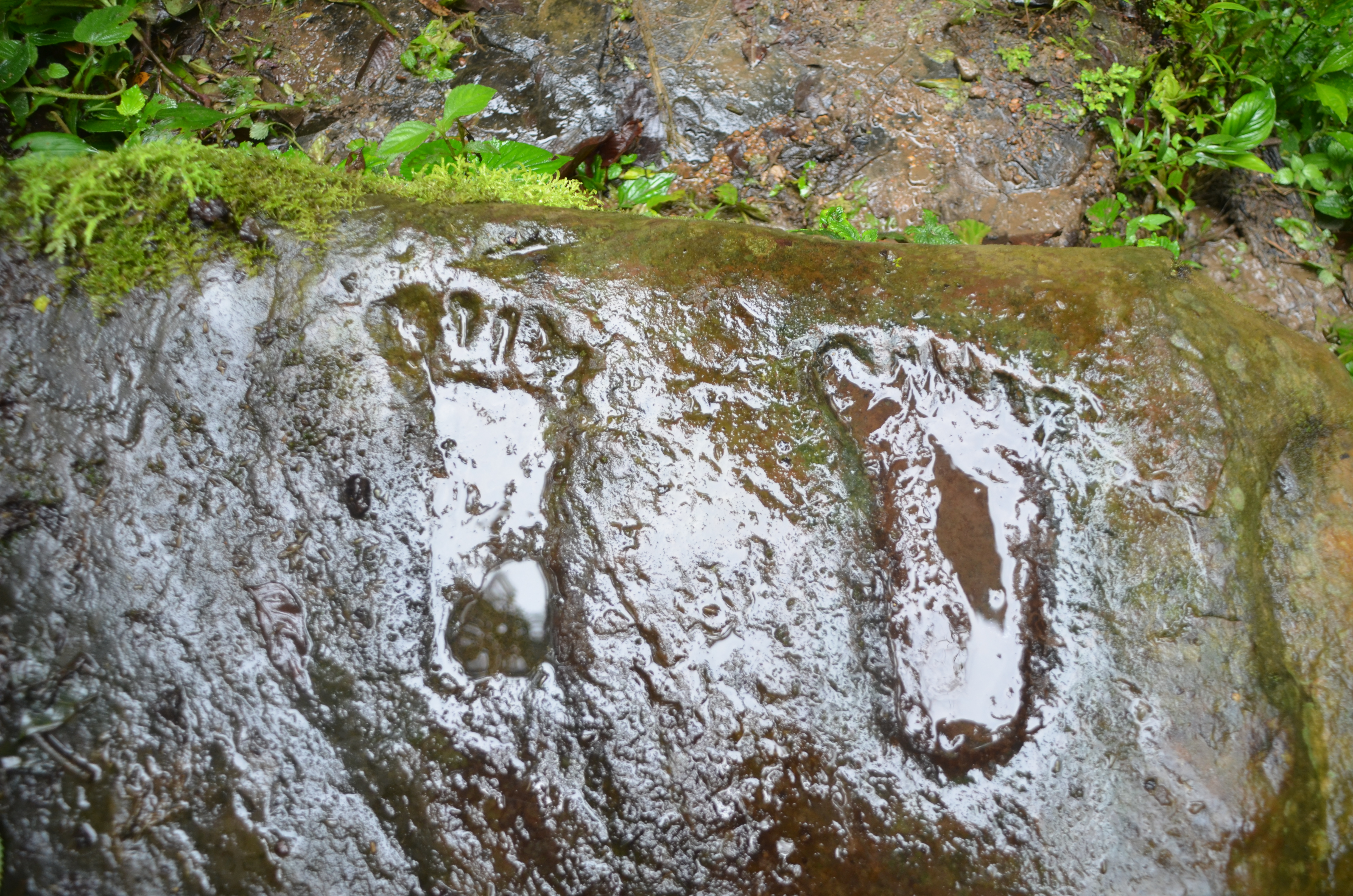 Huellas ubicada en la roca de las Cascadas del valle misterioso, Huambi, Sucua, Ecuador